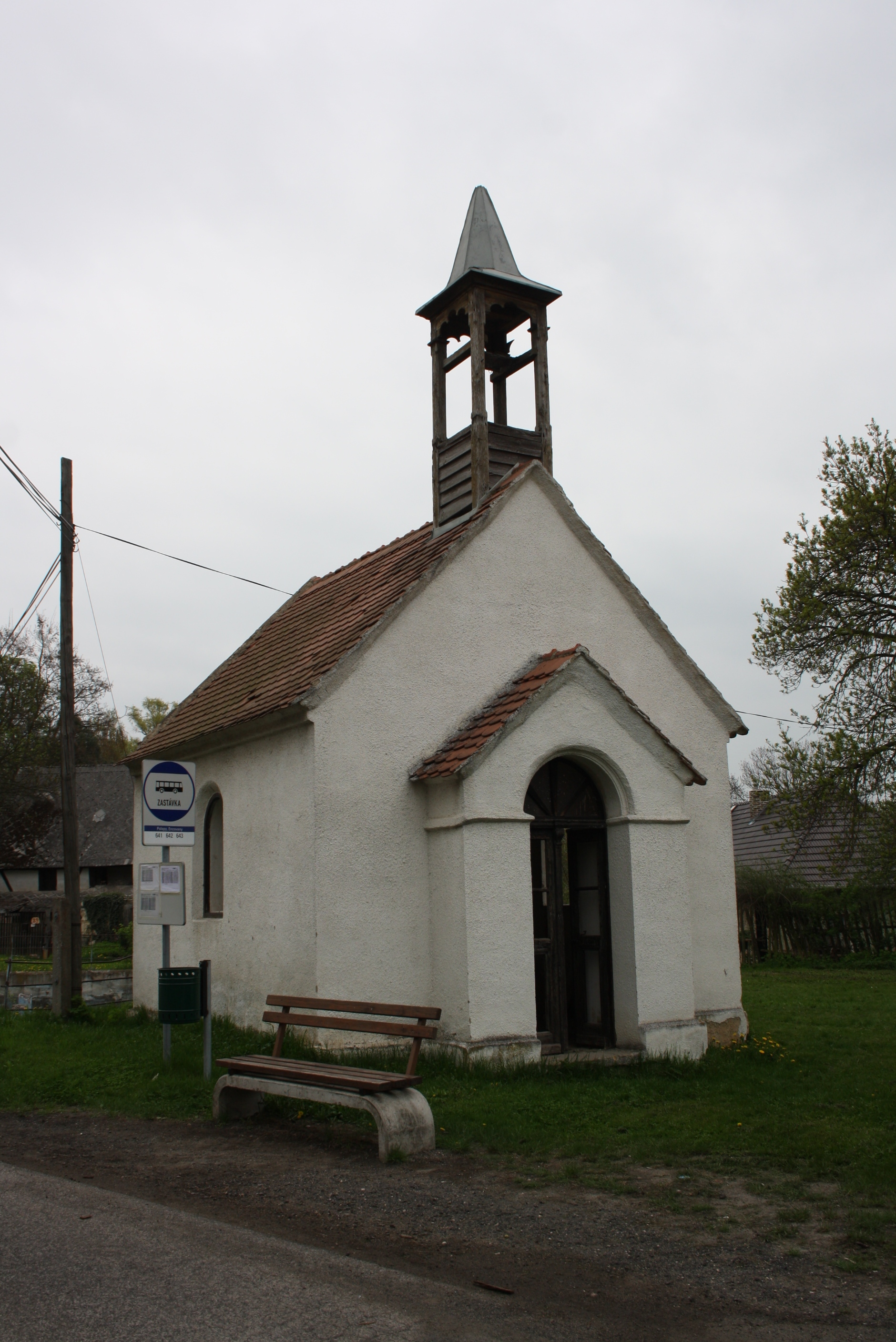 Kaplička Andělů Strážců v Encovanech (pohled od západu).